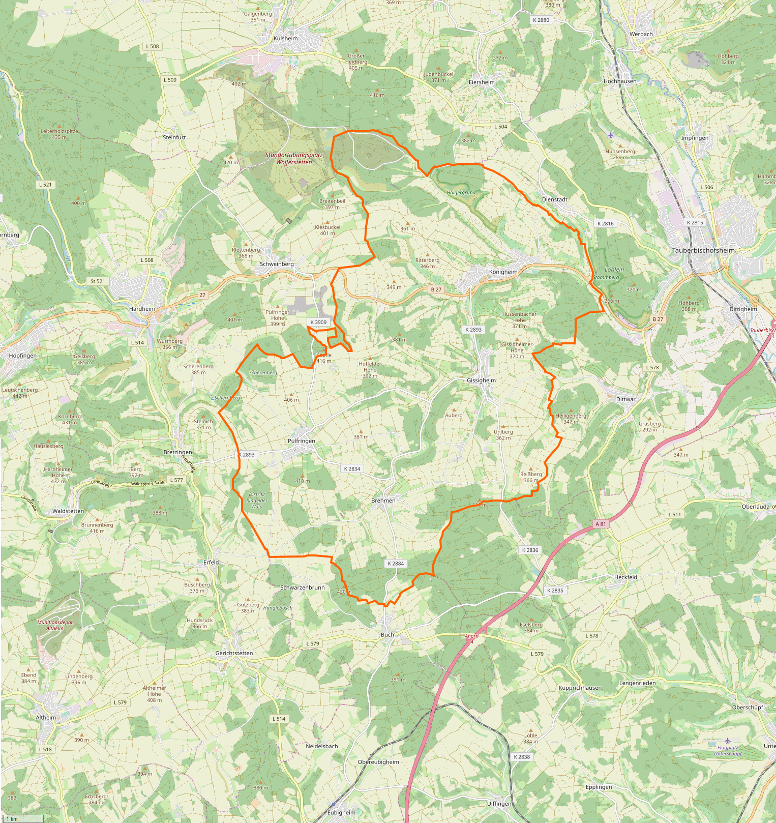 Gemarkung und Lage der Gemeinde Königheim. Siehe auch: Liste der Kulturdenkmale in Königheim. Liste der Straßennamen von Königheim. Gemarkungen und Lagen der Städte und sonstigen Gemeinden im Main-Tauber-Kreis: Ahorn · Assamstadt · Bad Mergentheim · Boxberg · Creglingen · Freudenberg · Großrinderfeld · Grünsfeld · Igersheim · Königheim · Külsheim · Lauda-Königshofen · Niederstetten · Tauberbischofsheim · Weikersheim · Werbach · Wertheim · Wittighausen